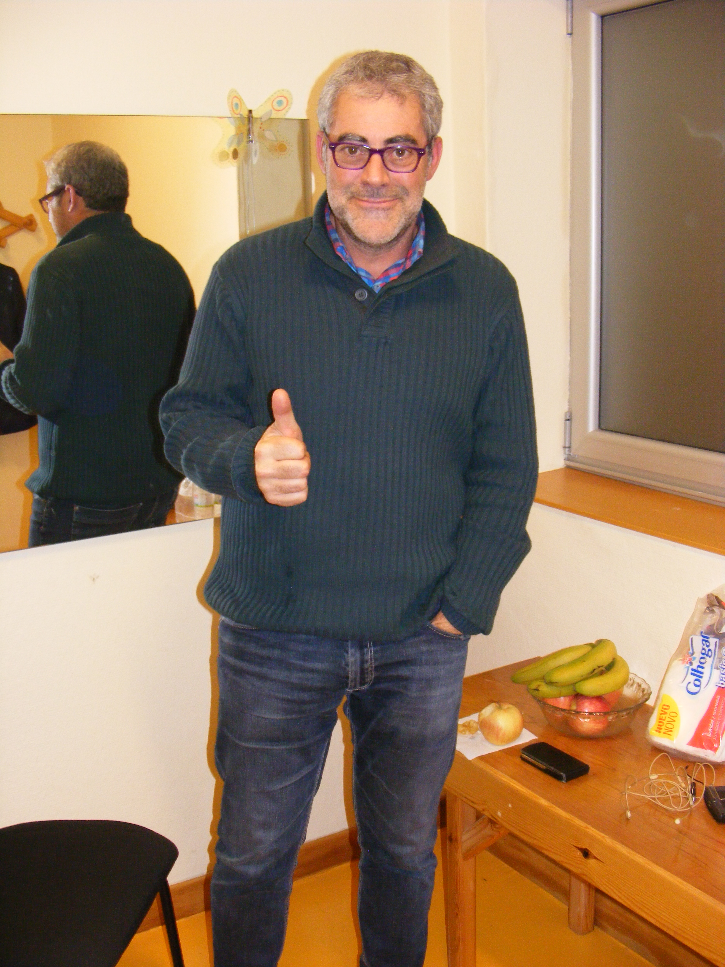 Carlos Blanco Vila actor español en el Auditorio Municipal de O Rosal